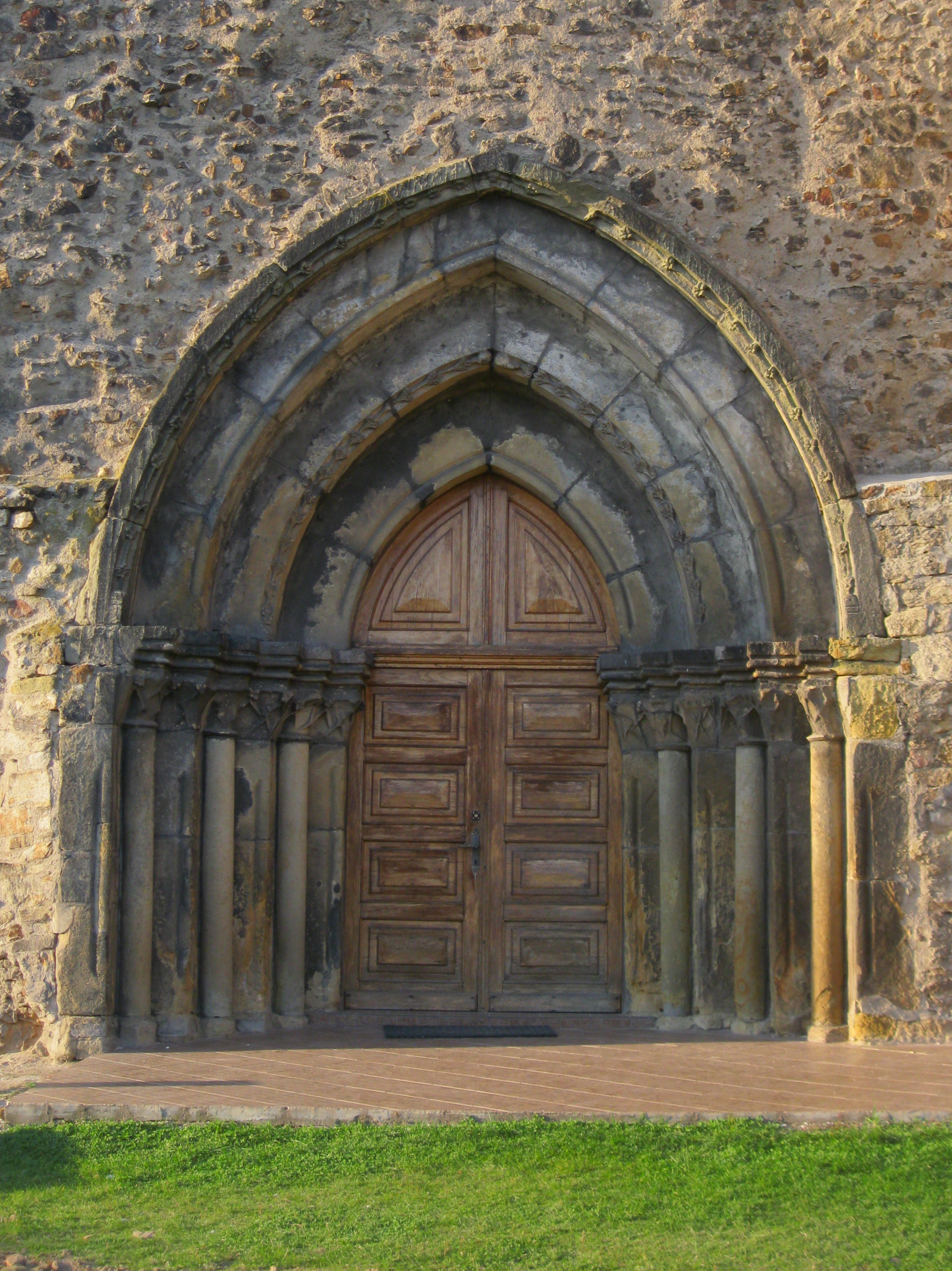 Pożarzysko - kościół p.w. św. Józefa (zabytek nr A/1680/204)